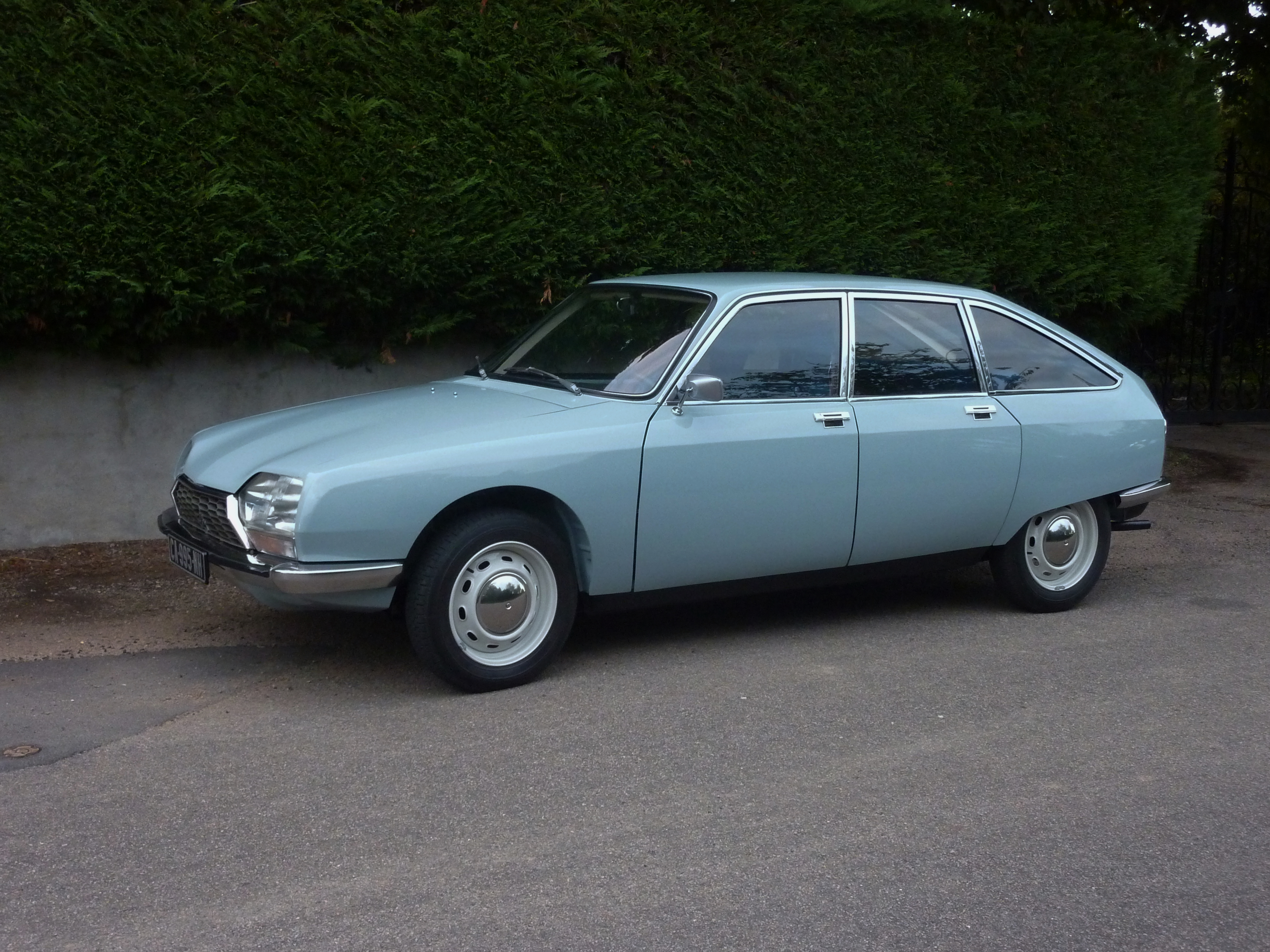 GS Club 1971 bleu Thasos